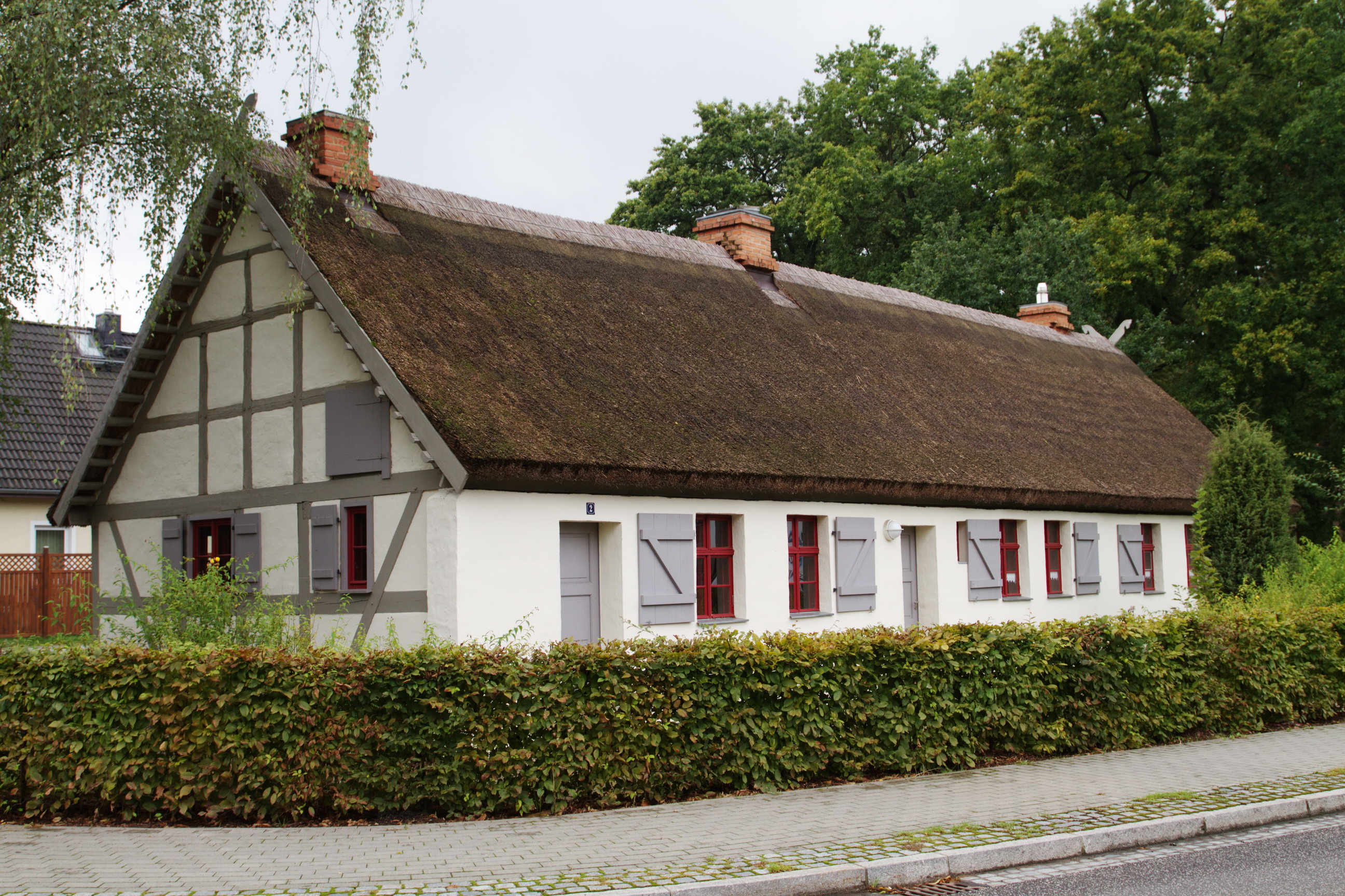 „Strohhaus“ in Groß Kreutz - ehemalige Gutsarbeiterkate für drei Familien, jetzt Dorfgemeinschaftshaus und Begegnungsstätte.